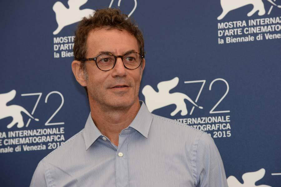 Francesco Patierno, President jury Venezia Classici